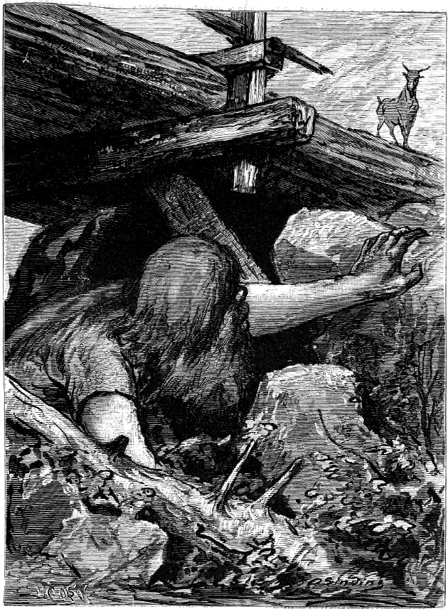 Illustration for the Norwegian fairy tale "De tre bukkerne Bruse" in Norske folke- og huldre-eventyr from 1879